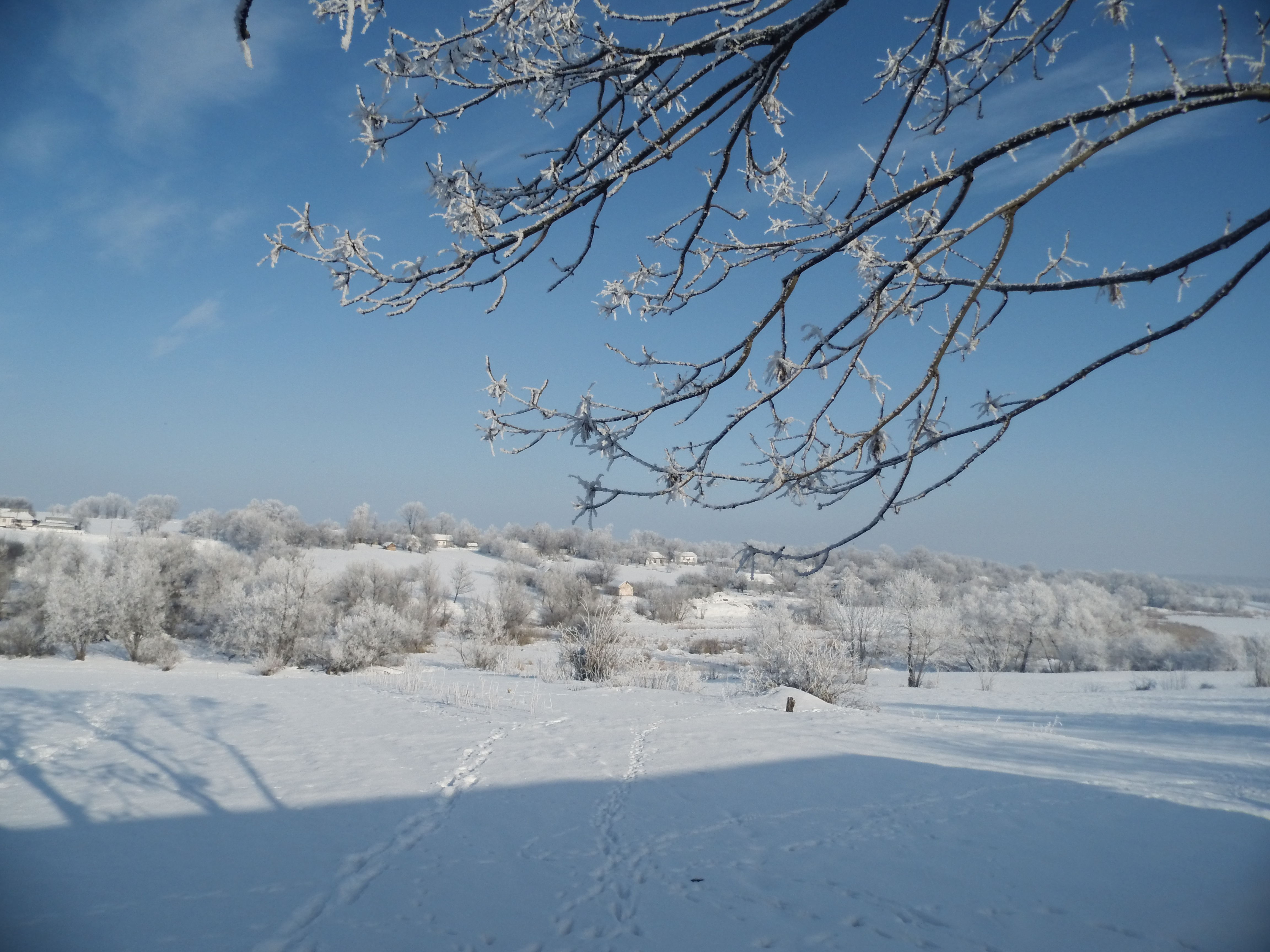 Зимовий пейзаж, фото зроблене зимою 2013